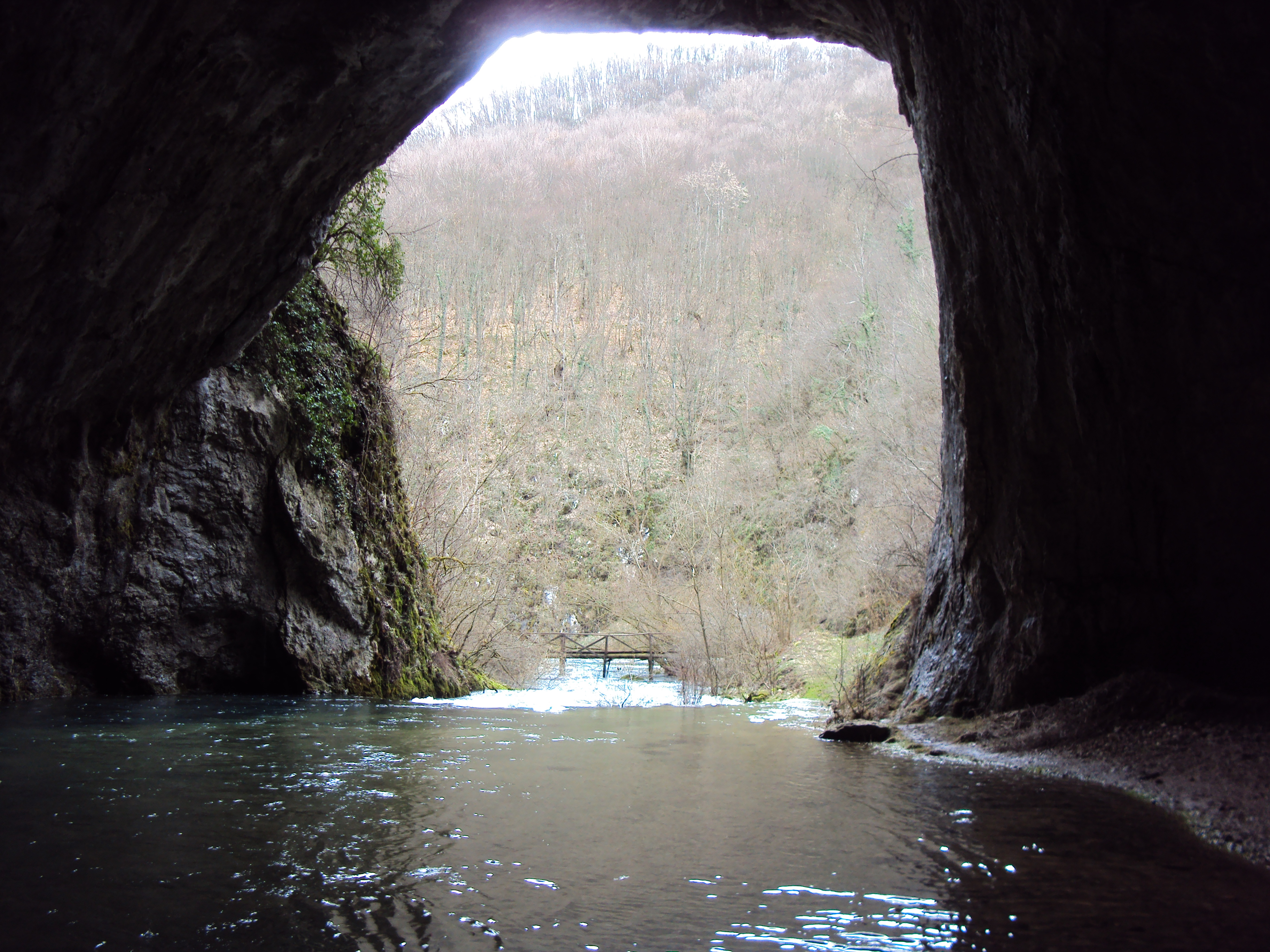 Dabarska Pecina